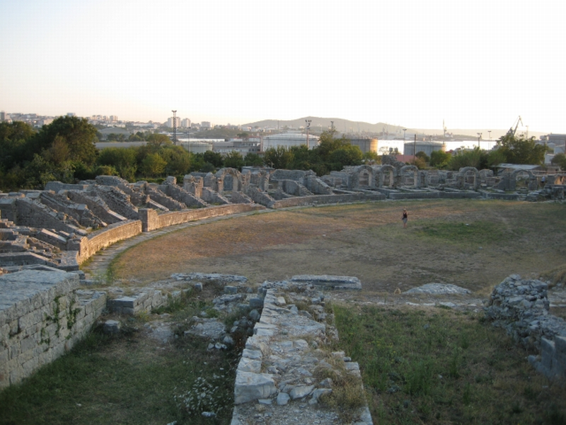 Salona, amfiteatar, Solin, Croatia